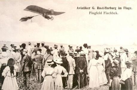 Flugpionier Gottlieb Rost bei einem Flug über das Fluggelände Fischbeker Heide (Postkarte von 1910)